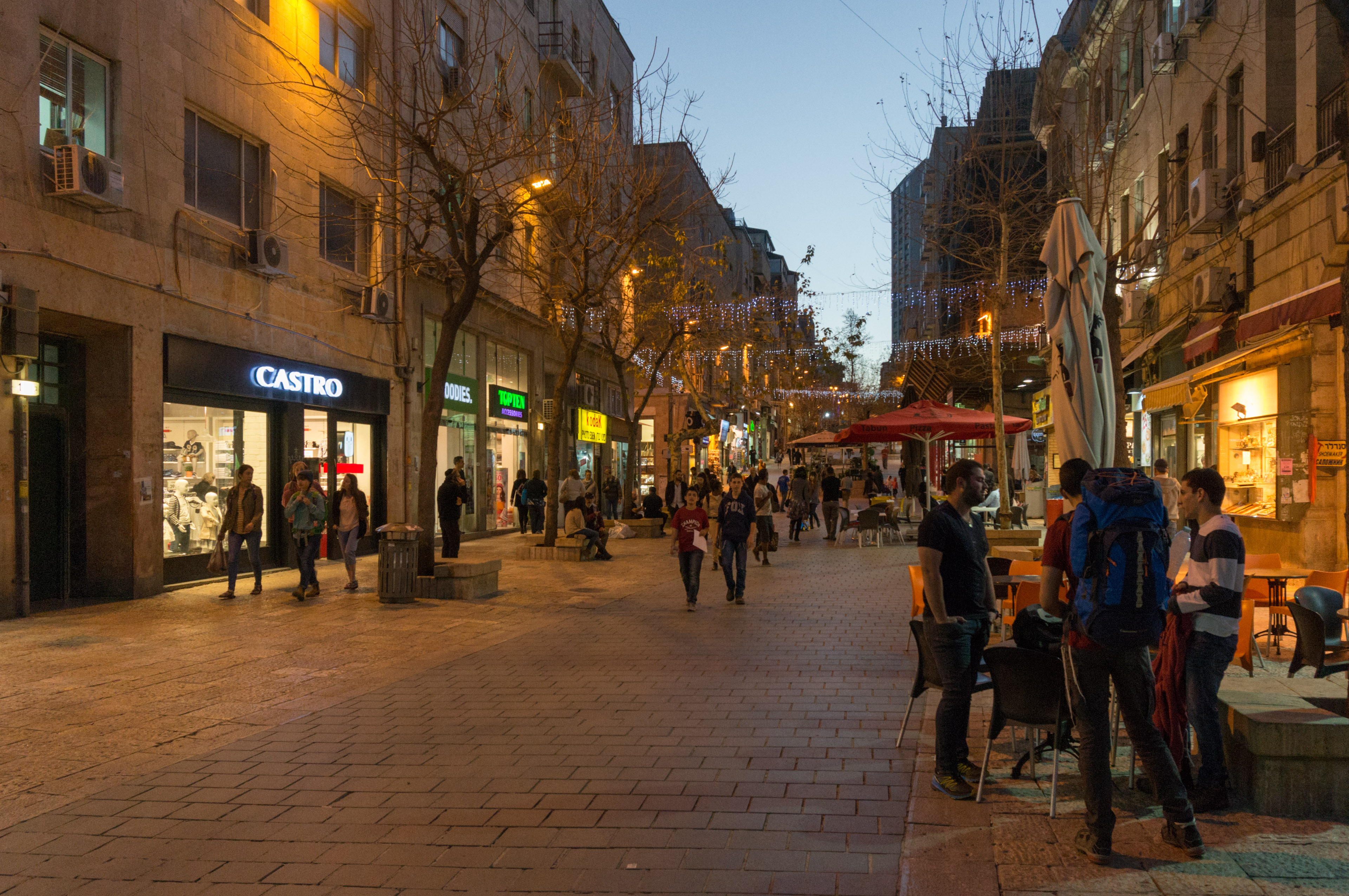 DSC06712.jpg Jerusalem